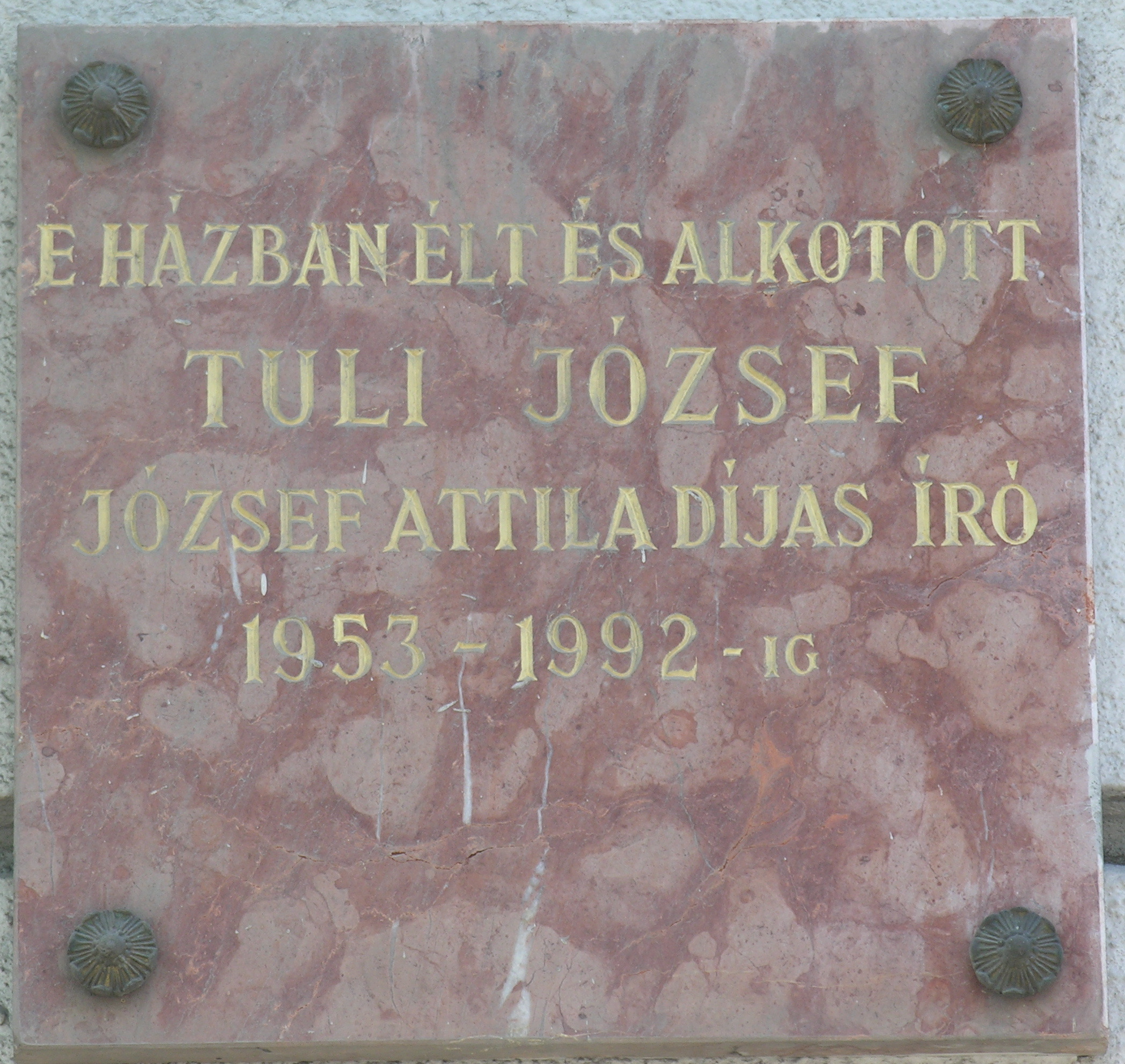 Tuli József emléktáblája, Budapest, II., Bem rakpart 43.